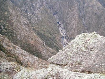 Parque Nacional quebrada de Condoritos